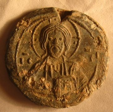 Пячаць Ефрасінні Полацкай, знойдзеная ў Полацку пры раскопках на тэрыторыі Спаса-Ефрасіннеўскага манастыра